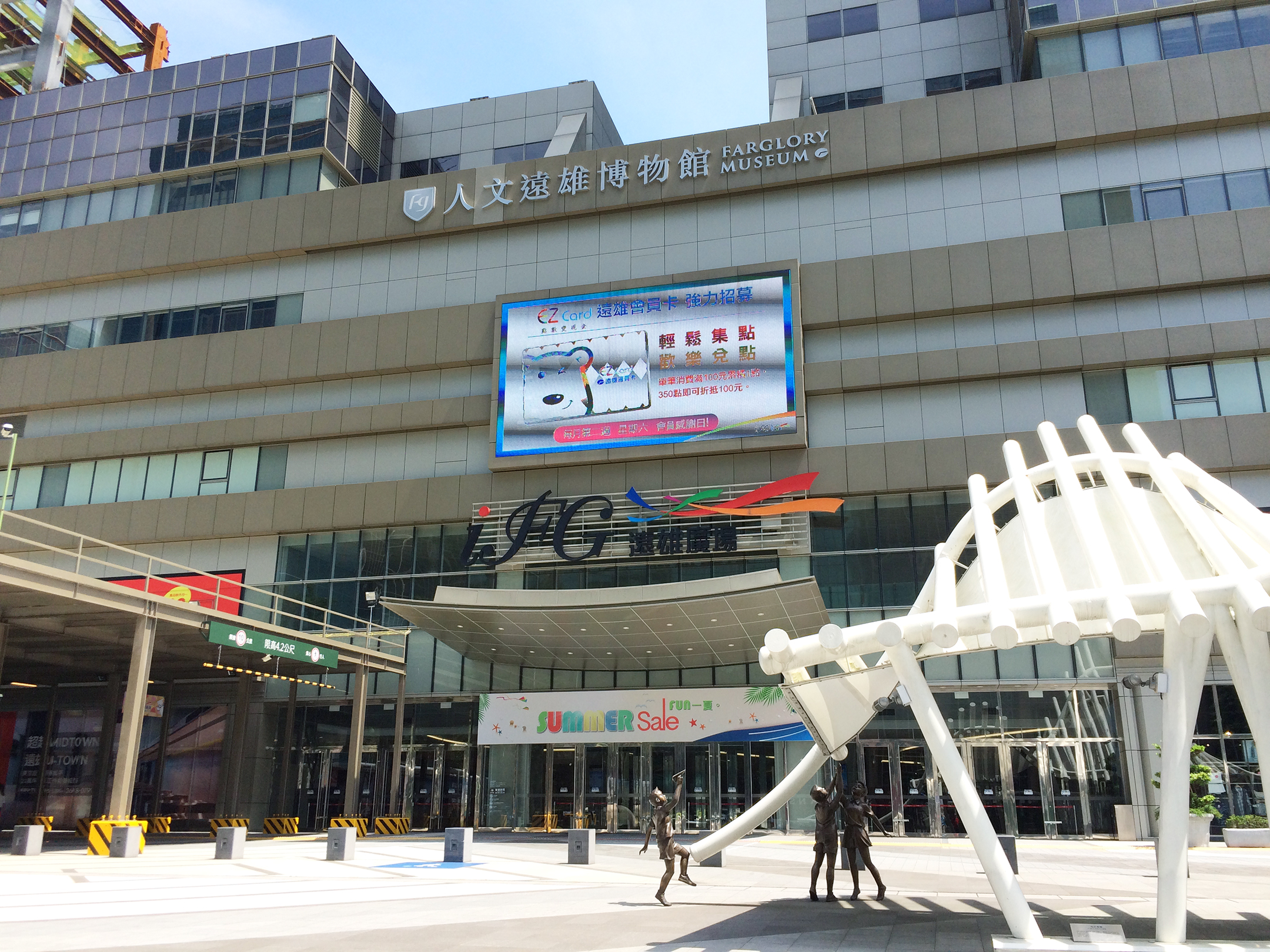 遠雄U-Town一至四樓為iFG遠雄廣場與人文遠雄博物館。